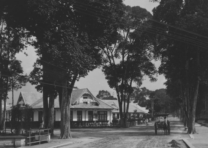 foto. Straatgezicht bij Hotel Centrum in Fort de Kock